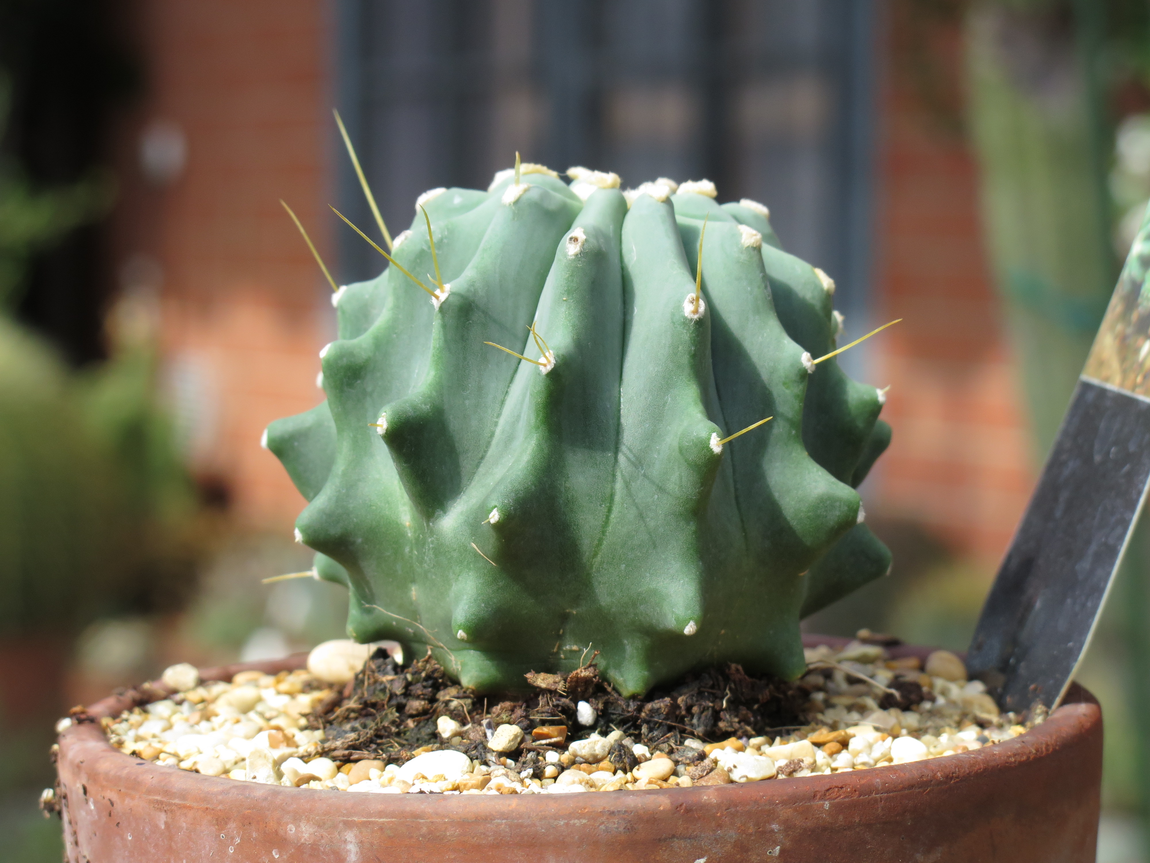 Ferocactus glaucesens inermis